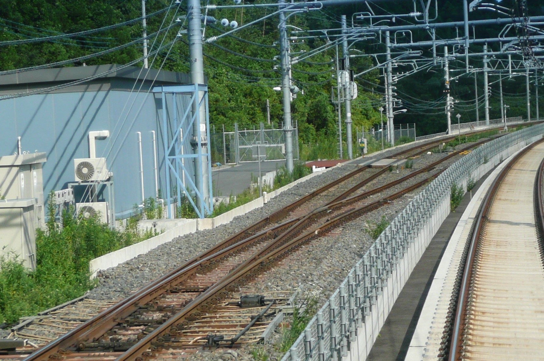 堀之内信号場。分岐器のある左側2線が成田線の堀之内信号場。右側1線は京成成田空港線。